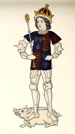 Richard III.